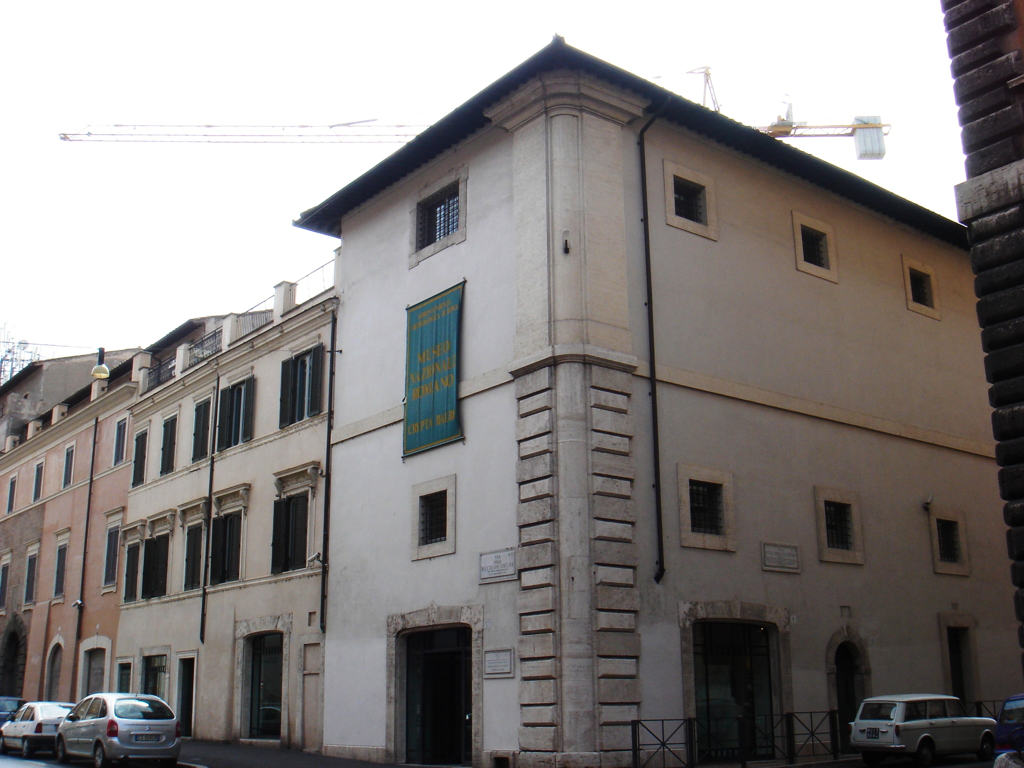 Roma, Museo Nazionale Romano: ingresso della sede alla Crypta Balbi.